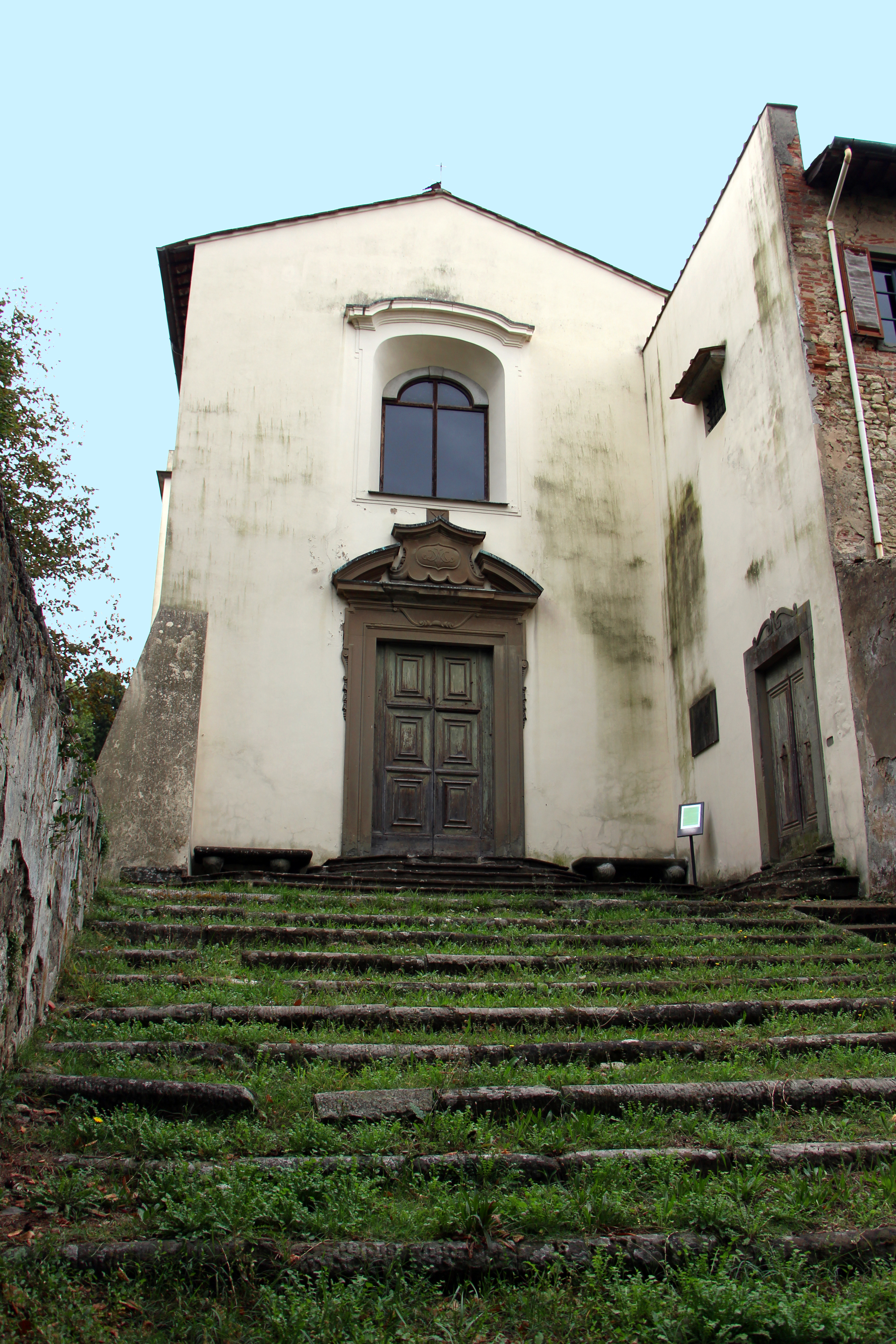 Santa Maria delle Selve, Lastra a Signa